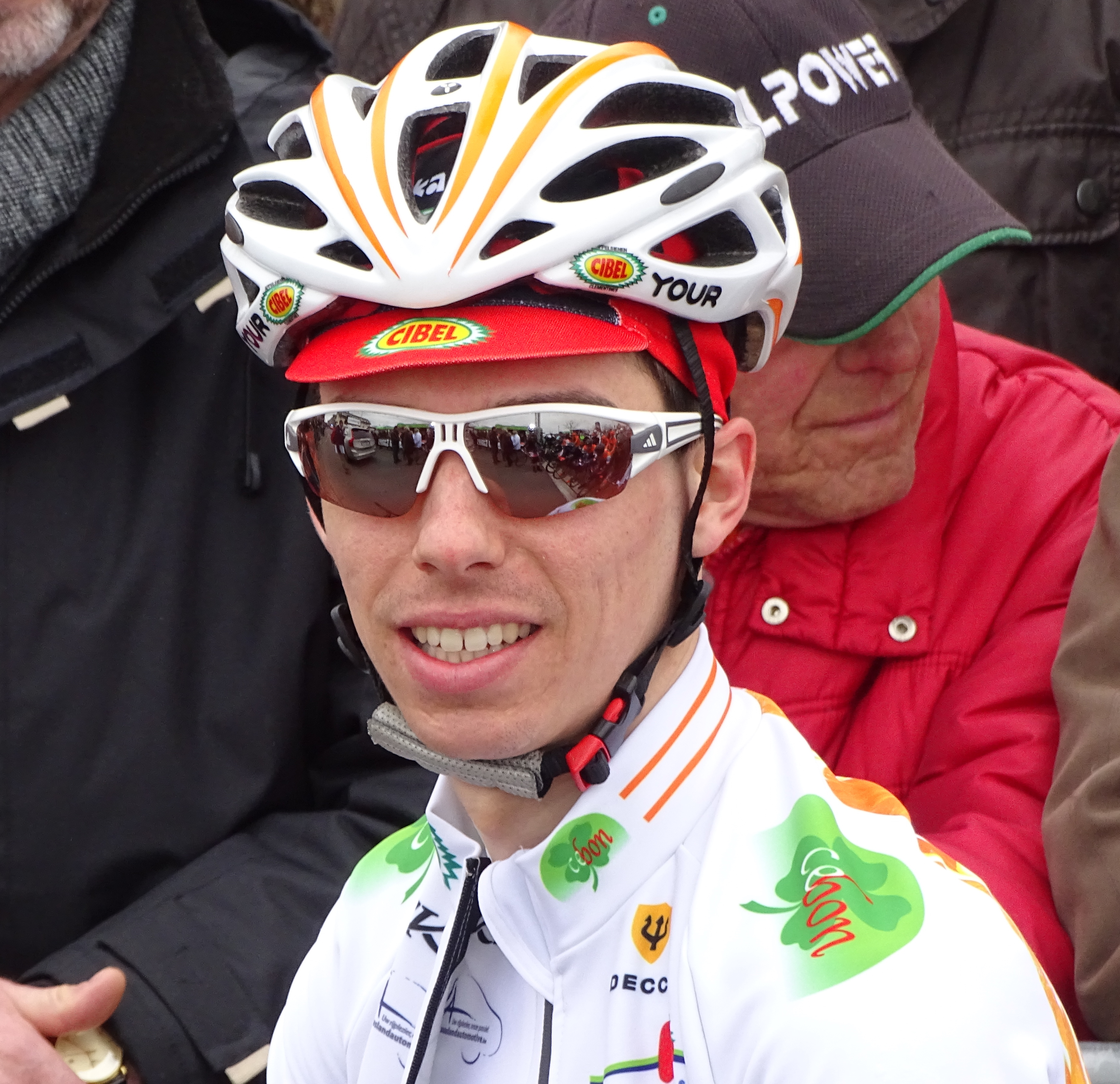 Reportage réalisé le vendredi 18 mars à l'occasion du départ de la Handzame Classic 2016 à Bredene, Belgique.